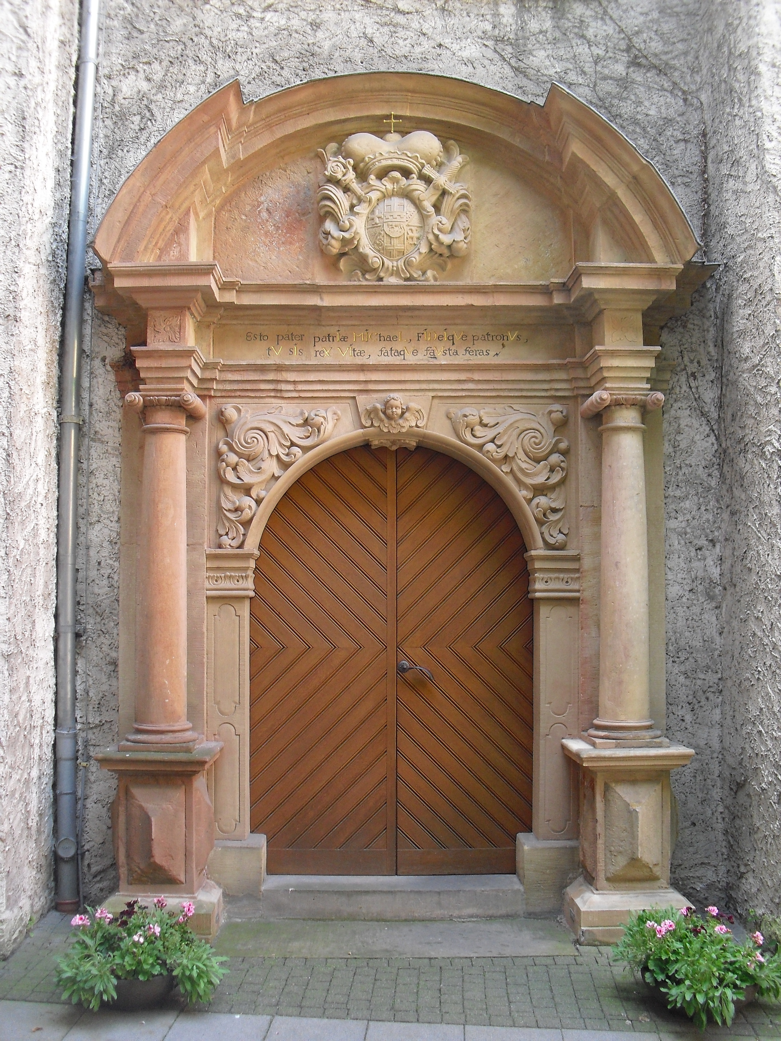 Portal der Michaelskirche in Paderborn. Die Inschrift ist ein Chronogramm. Summiert man die farbig markierten römischen Ziffern erhält man die Zahl 1696, das Datum der Stiftungsurkunde. Inschrift